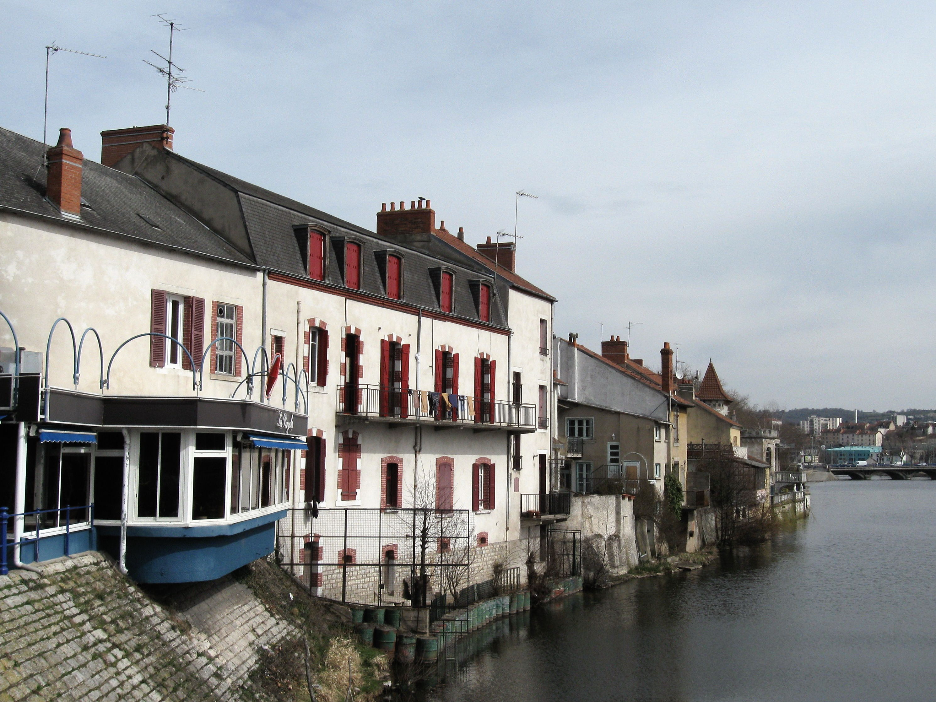 Maisons au bord du Cher, Montluçon, Allier, France